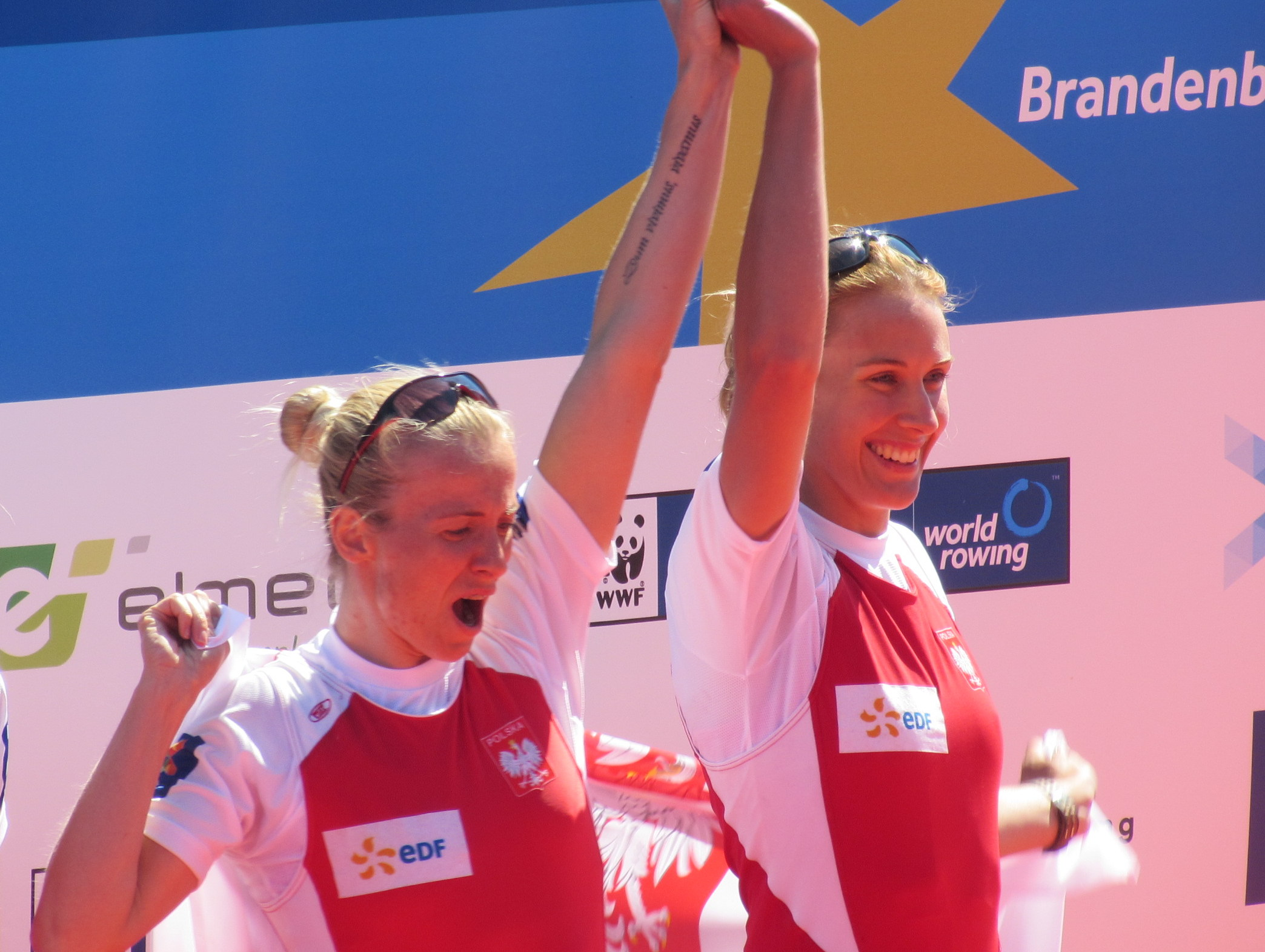 Weronika Deresz, Joanna Dorociak, Ruder-EM 2016